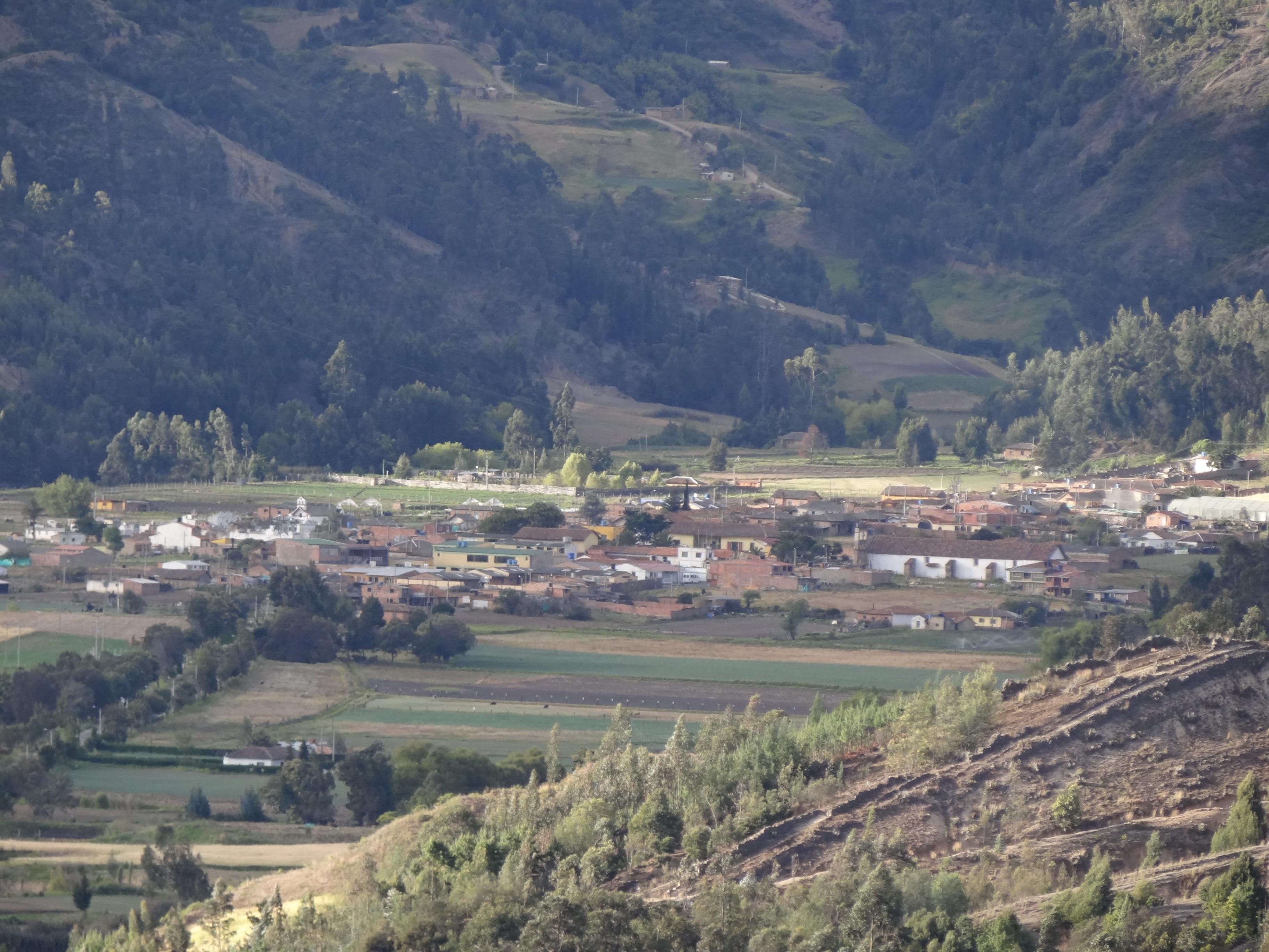 Detalle del área urbana del municipio de Sora, departamento de Boyacá, Colombia